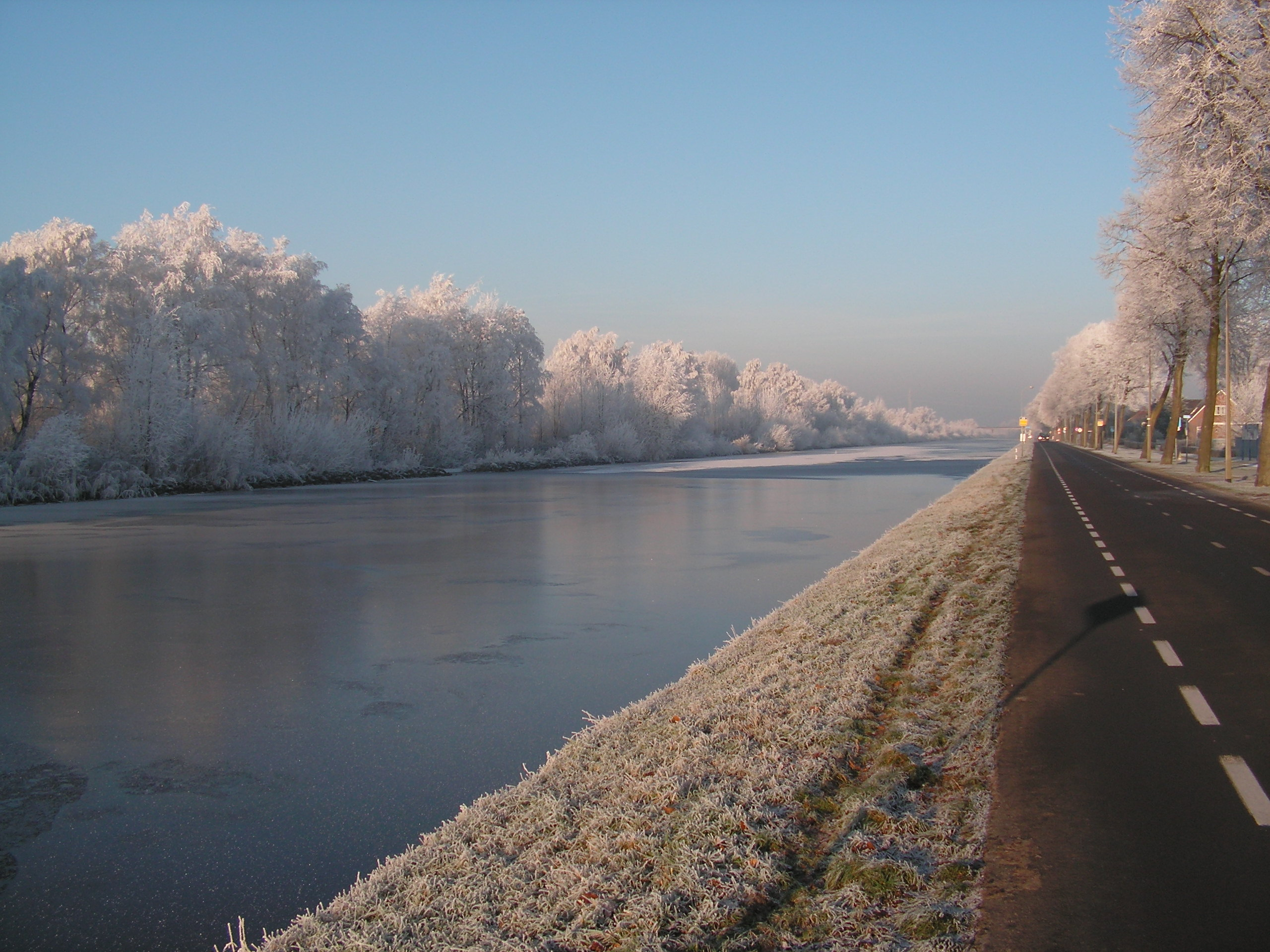 Aadorp, Overijssels kanaal